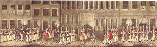 Maskerade van 1836 in de Oude Boteringestraat Groningen